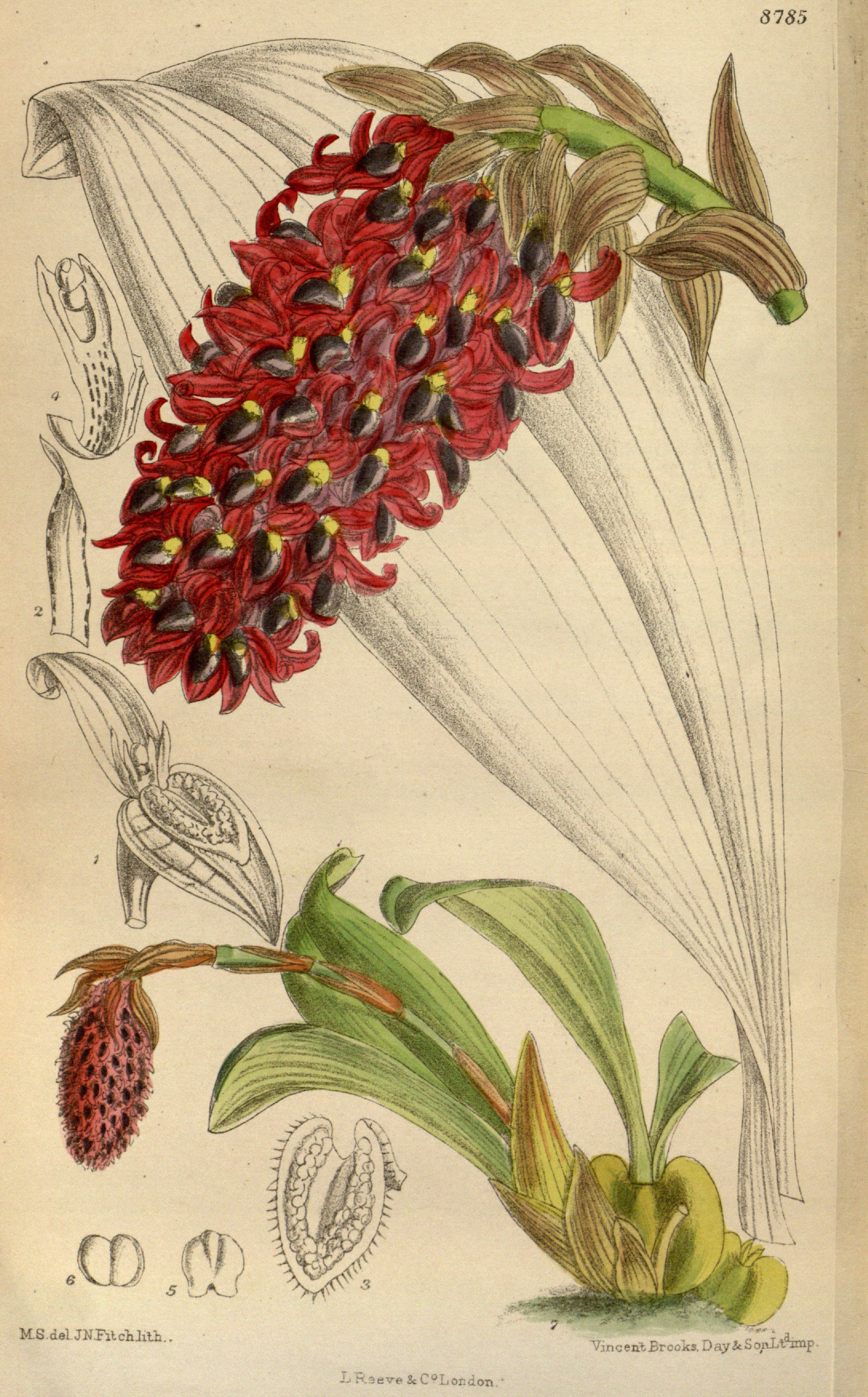 Bulbophyllum hamelinii, Orchidaceae